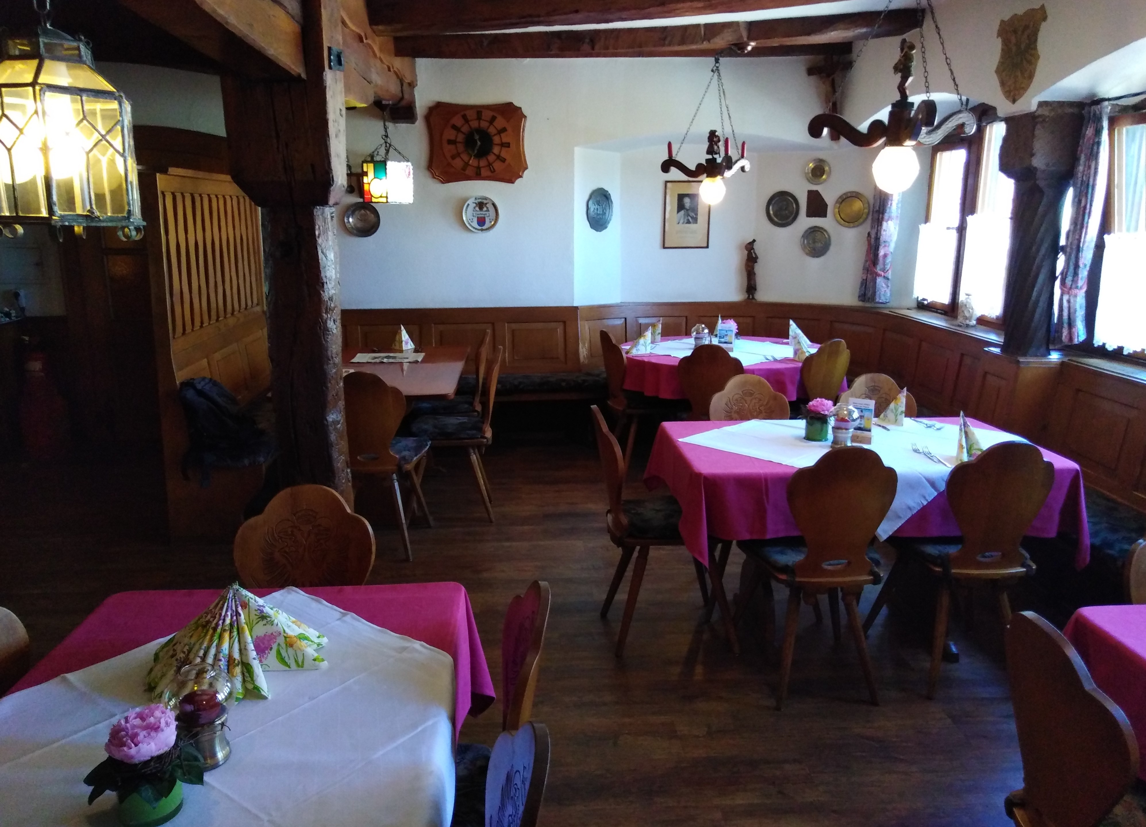 Gasthaus Adler in Lauchringen im Landkreis Waldshut in Baden-Württemberg. Ersterwähnung im Habsburger Urbar 1308. Gaststube des Gasthauses 2019.